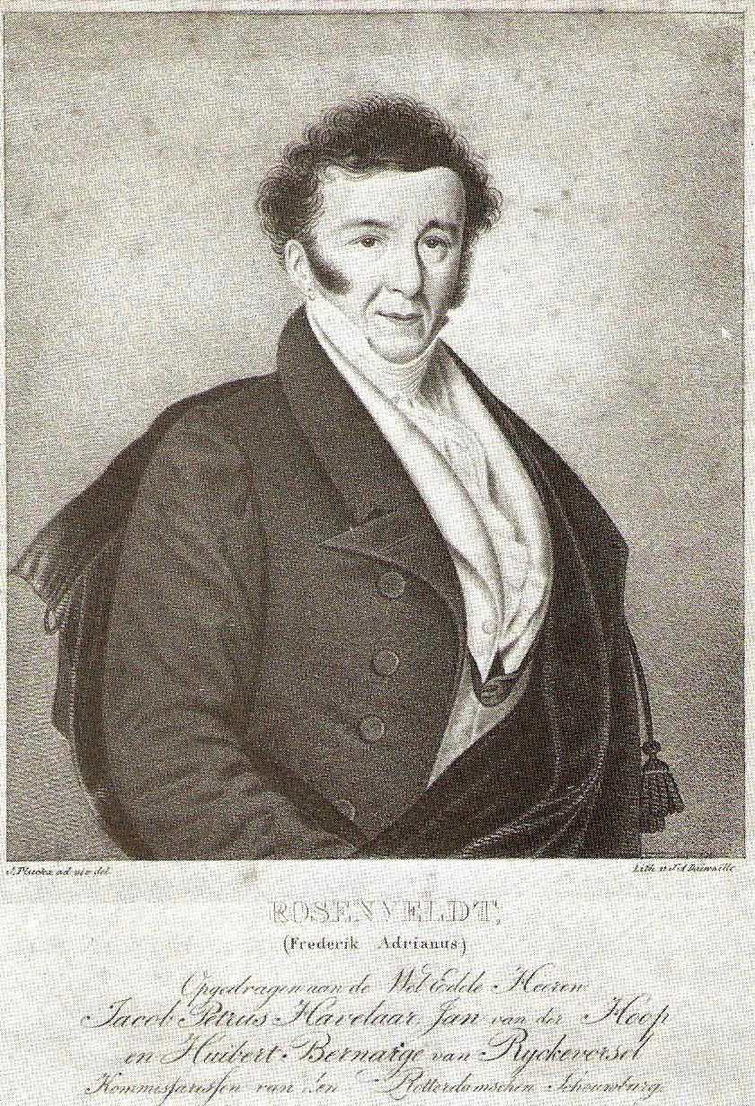 Frederikus Adrianus (Frits) Rosenveldt